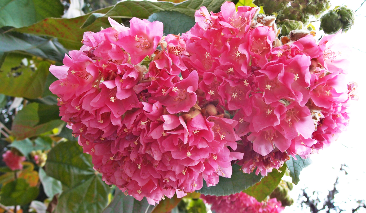 中文（香港）: 春天可以看到吊芙蓉（如圖）、山櫻花、櫻桃花等。